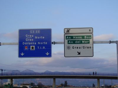 Indicador autovia CS-22